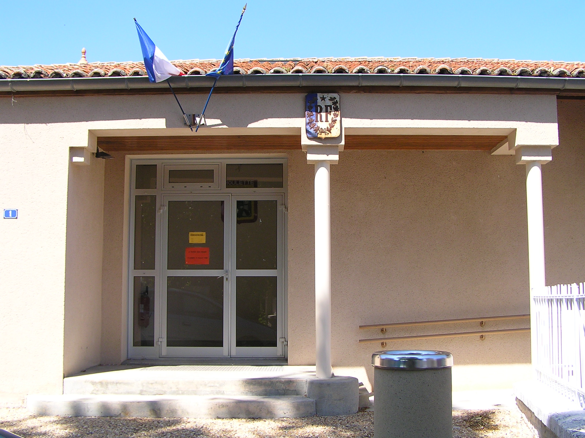 mairie de Houlette